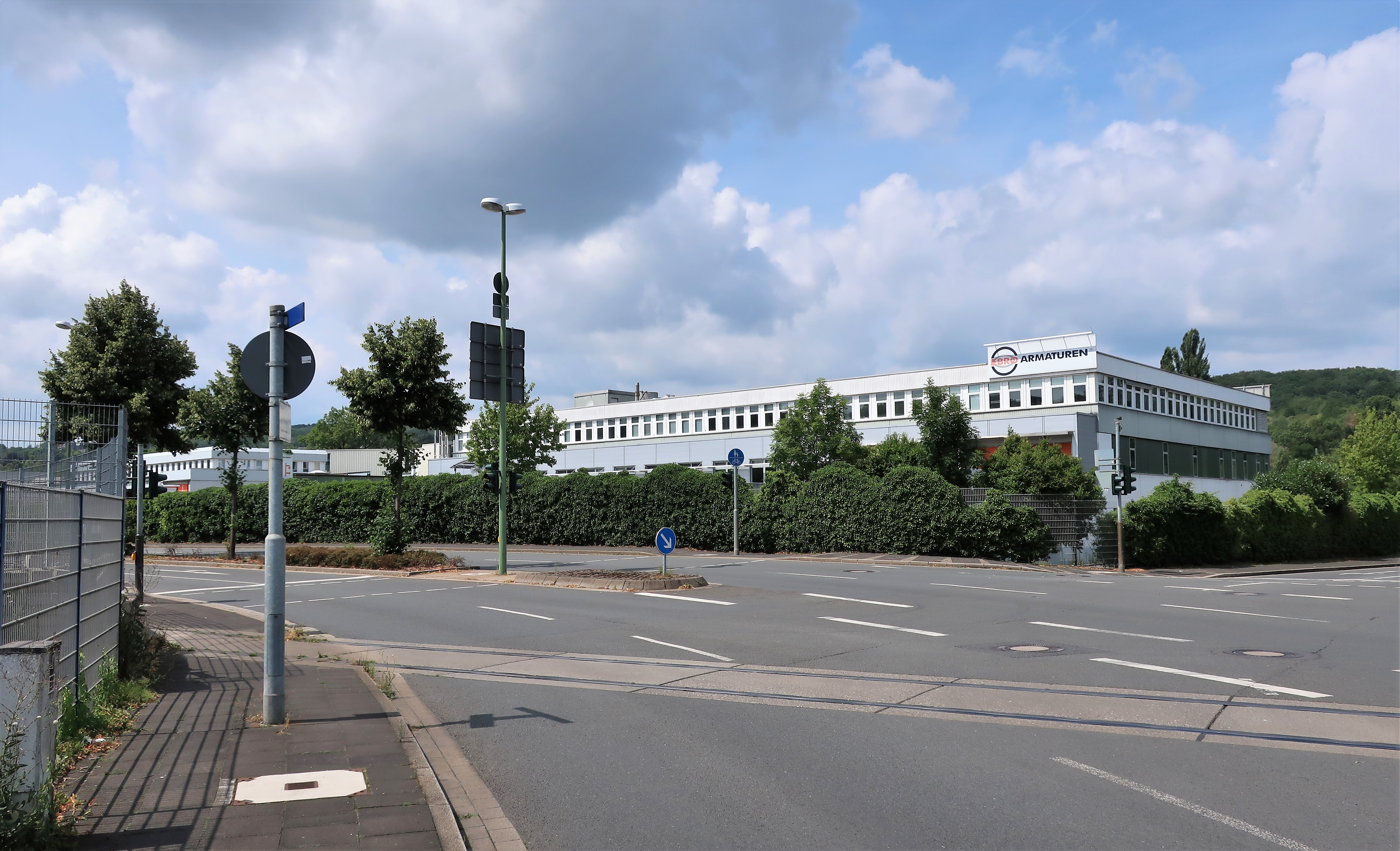 EBRO ARMATUREN Gebr. Bröer GmbH in Hagen-Haspe, Karlstraße 8, gegr. 1934.